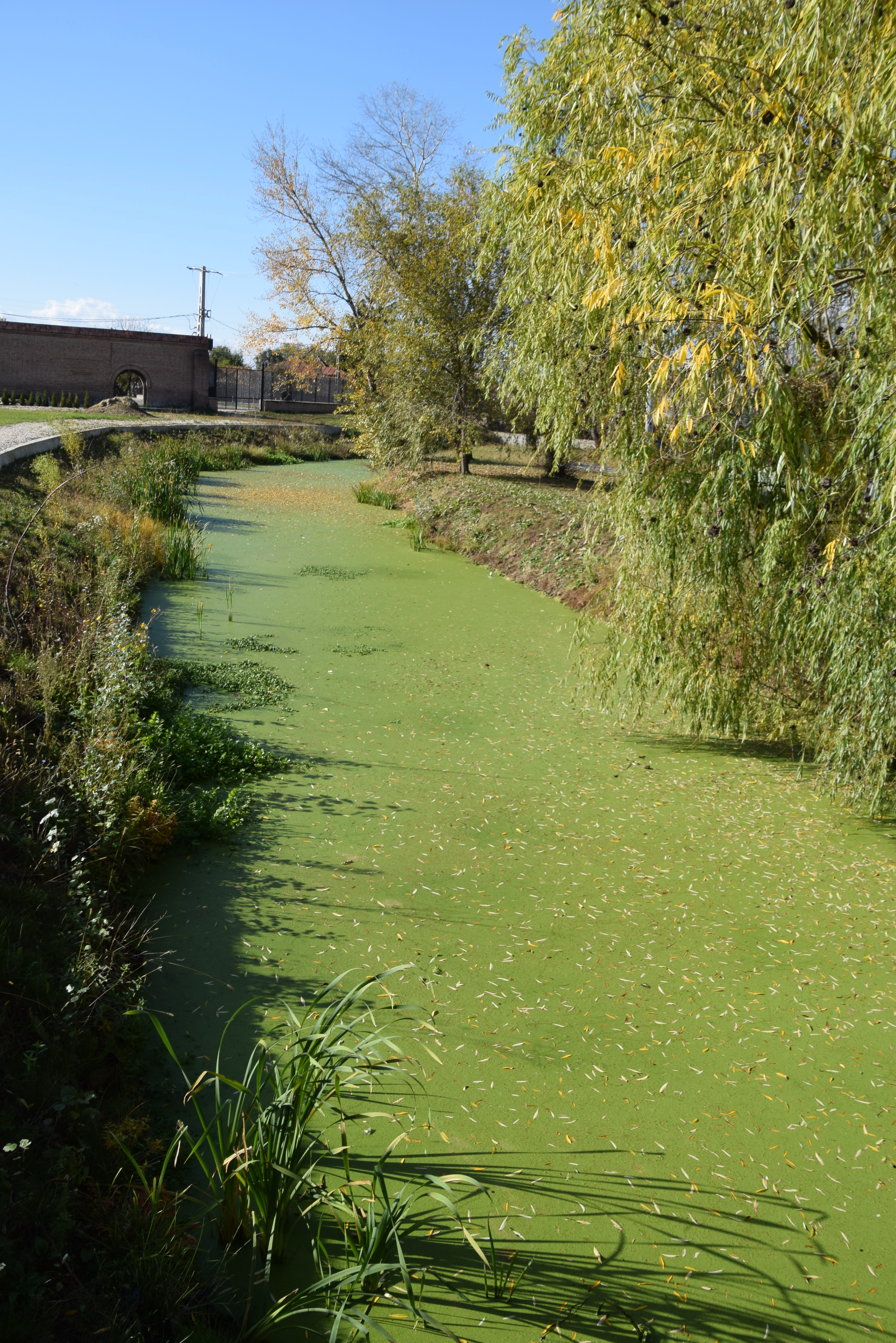 Fostul eleșteu artificial 09